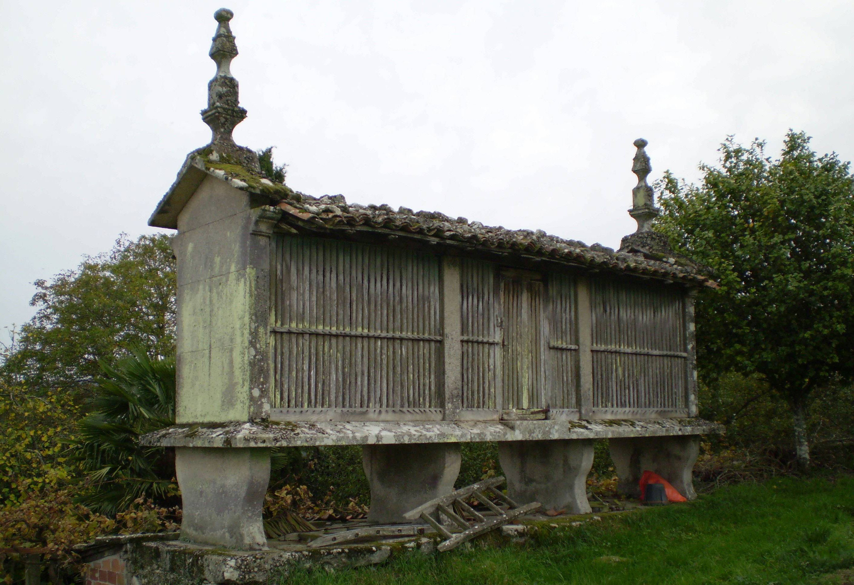 Hórreo de tres claros, sobre leve soleira e catro cepas copiformes. Cuberta de tella do país e dous lampións de motivos xeométricos rematados en esferas. Ubicado en Arcos (Antas de Ulla)